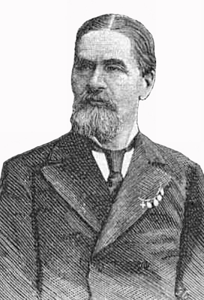 Подаруев Прокопий Иванович, купец 1-й гильдии